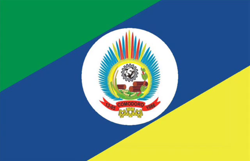 Bandeira do município de Comodoro, Mato Grosso, Brasil.